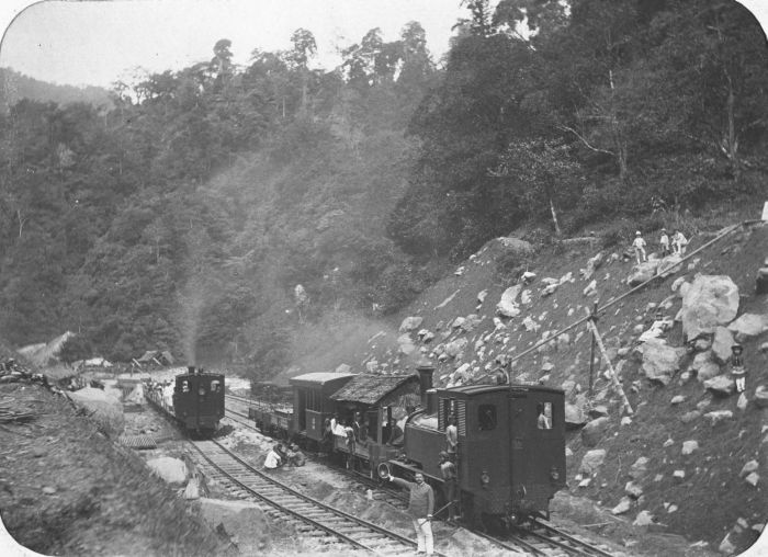 Foto. Spoorwegemplacement bij de halte Kandangampat